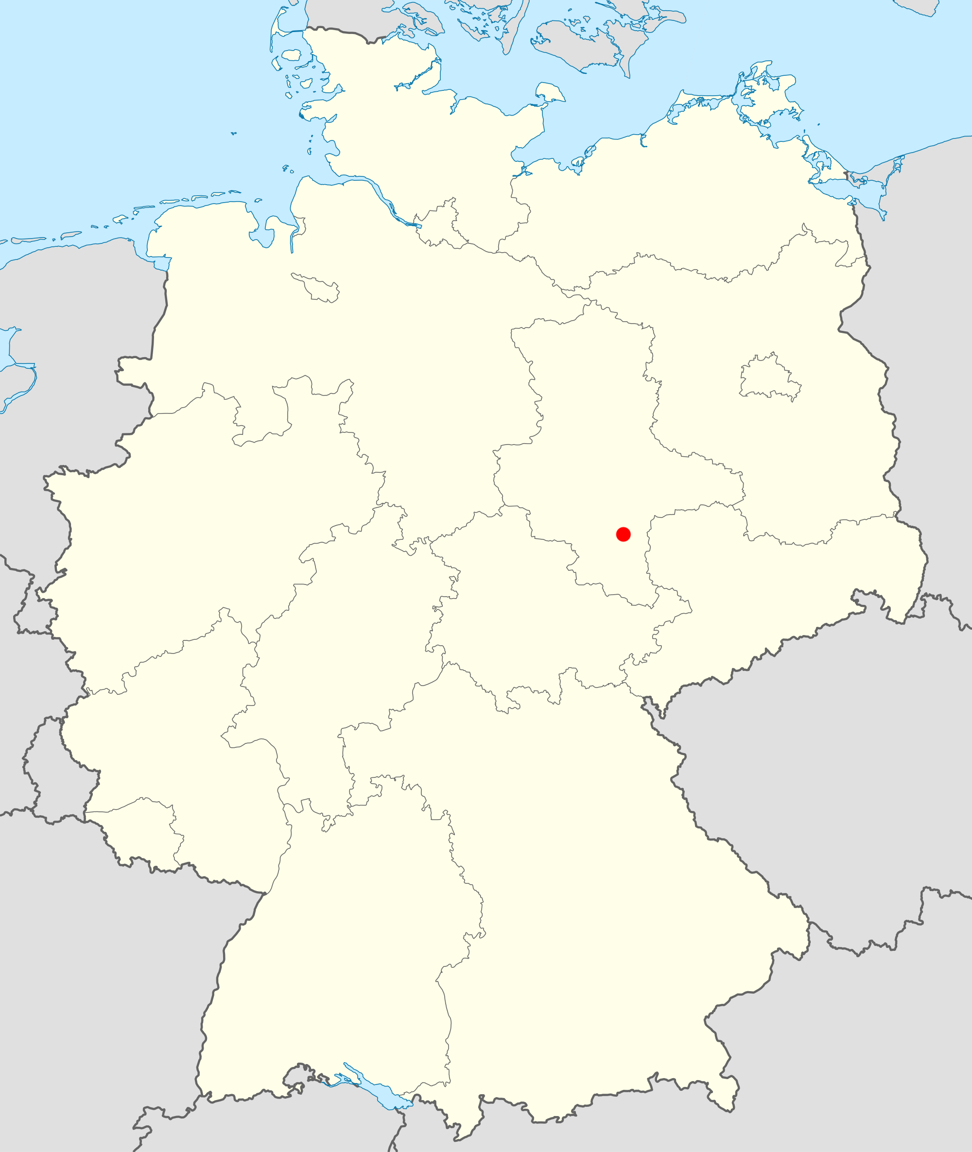 Karte Deutschlands mit der Lage der Stadt Halle (Saale)